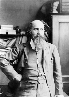 malíř a karikaturista Arpad Schmidhammer (1857-1921)